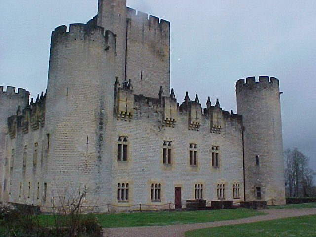 Roquetaillade